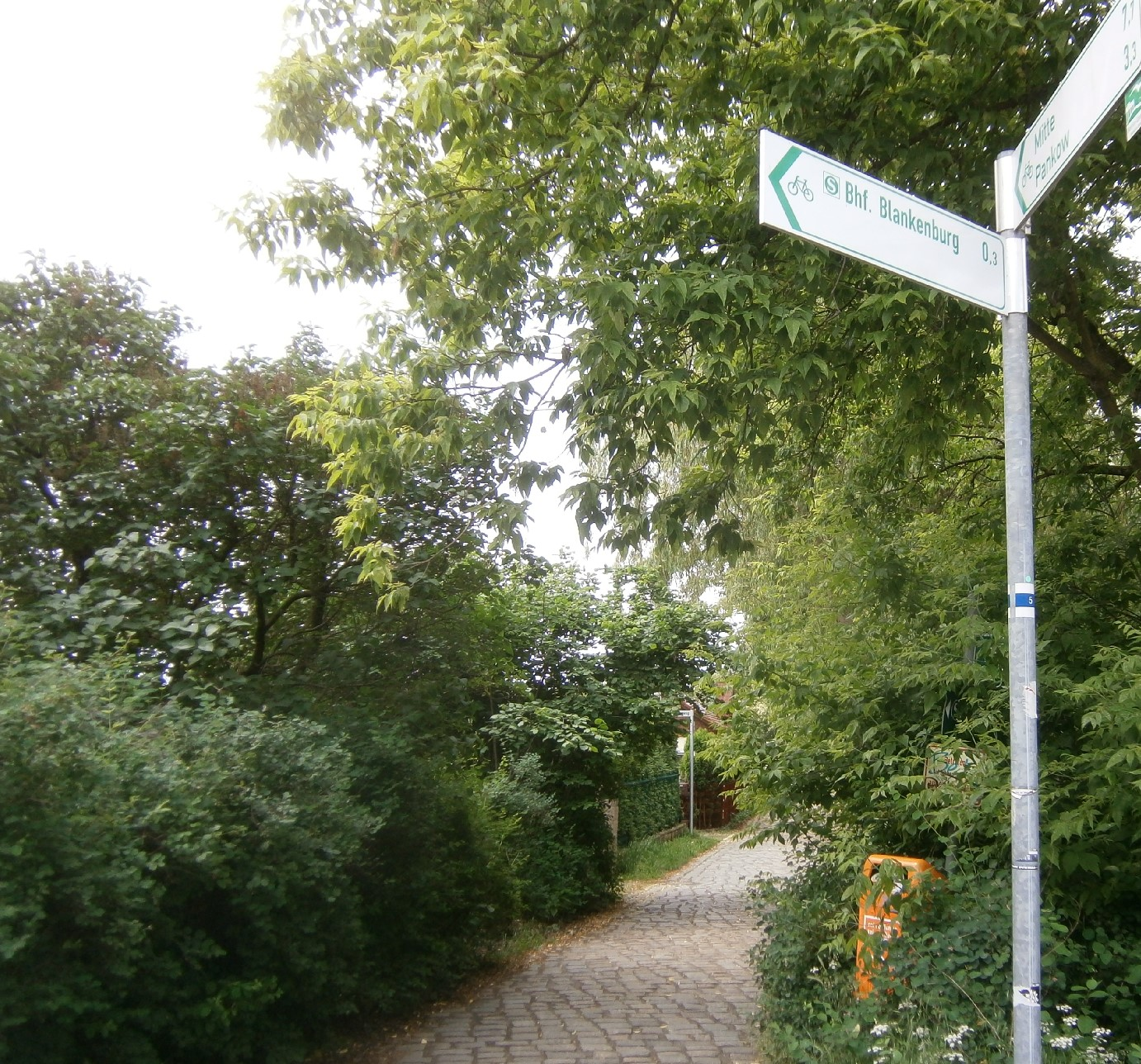 Der Nord-Süd-Weg mit der Markierung 05 ist einer der 20 grünen Hauptwege Berlins, die als Wanderwege duch die Großstadt Parks und Siedlungsfläche verbinden.